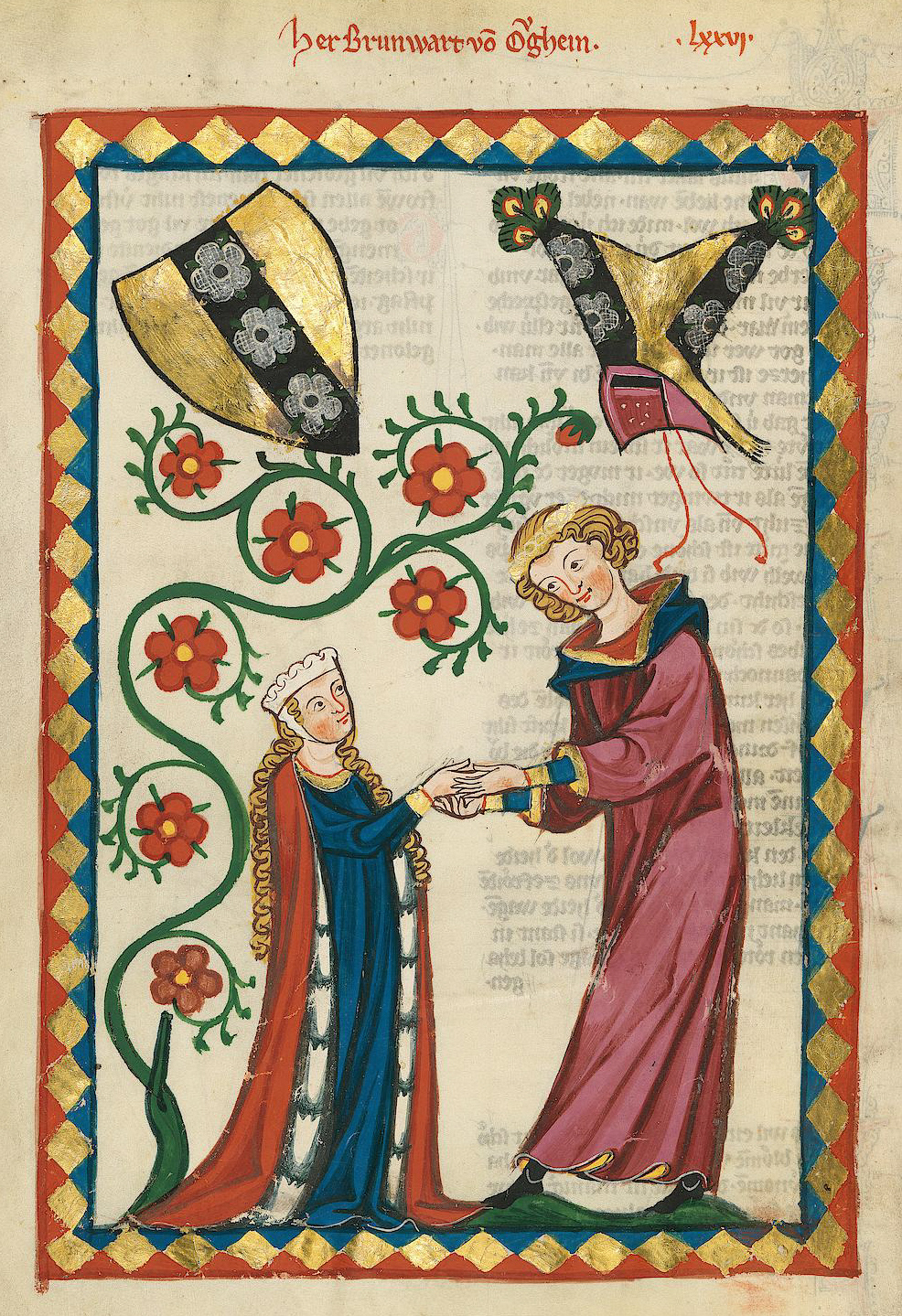 Codex Manesse, UB Heidelberg, Cod. Pal. germ. 848, fol. 258v: Herr Brunwart von Augheim